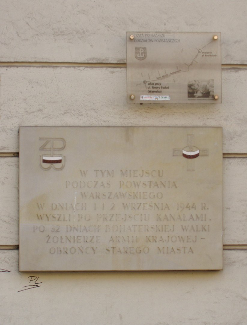 Wyjście obrońców Starego Miasta kanałami przy Nowym Świecie w Warszawie (fot Zu)